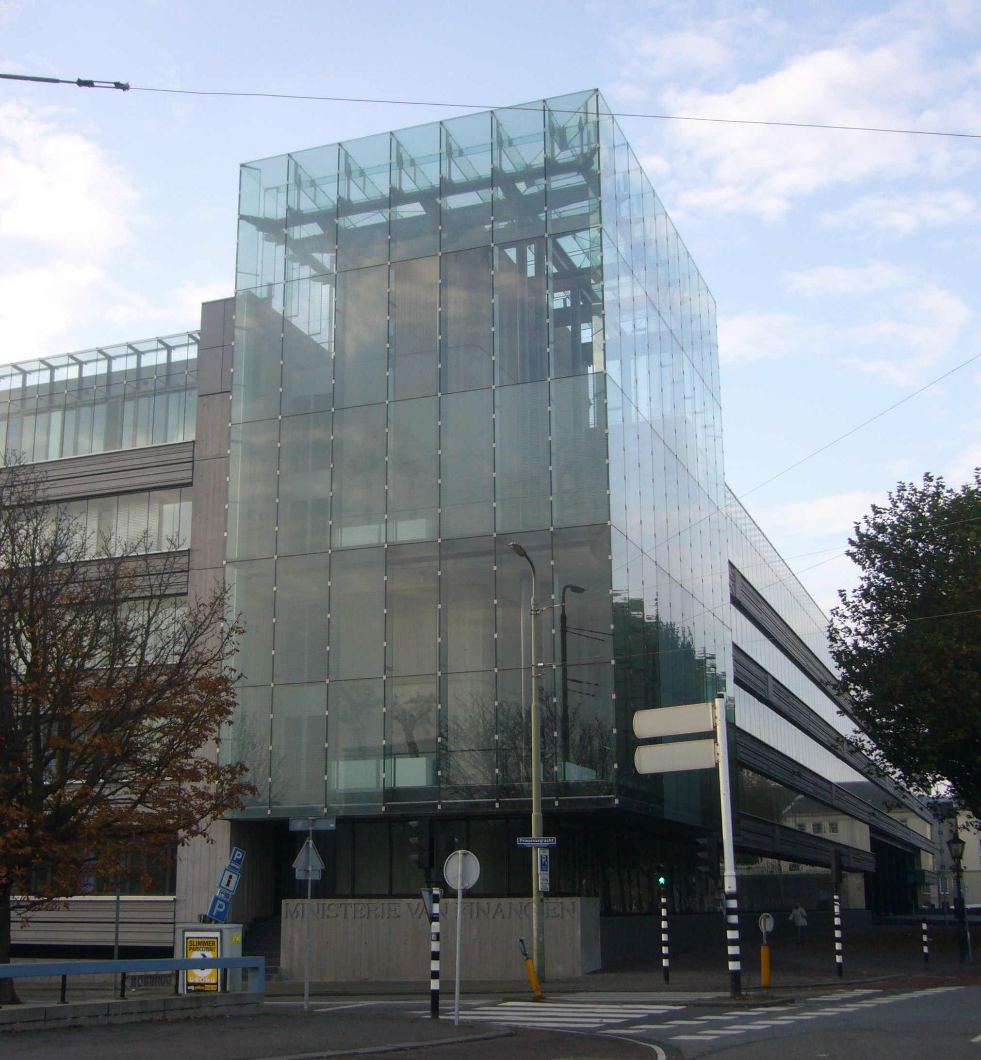 Ministerie van Financiën, hoek Korte Voorhout en Prinsessegracht, met wintertuin